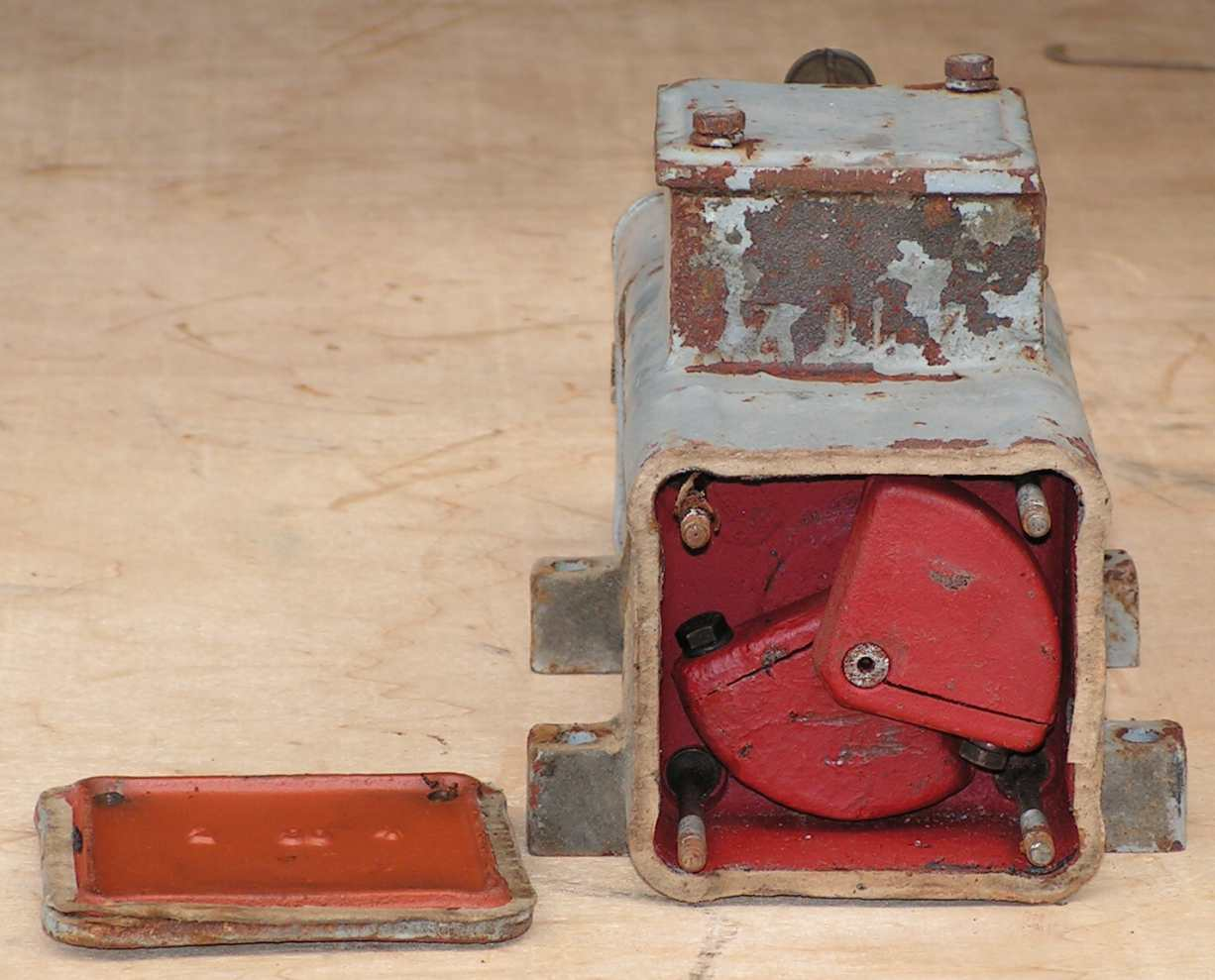 Unwuchtmotor Detailansicht